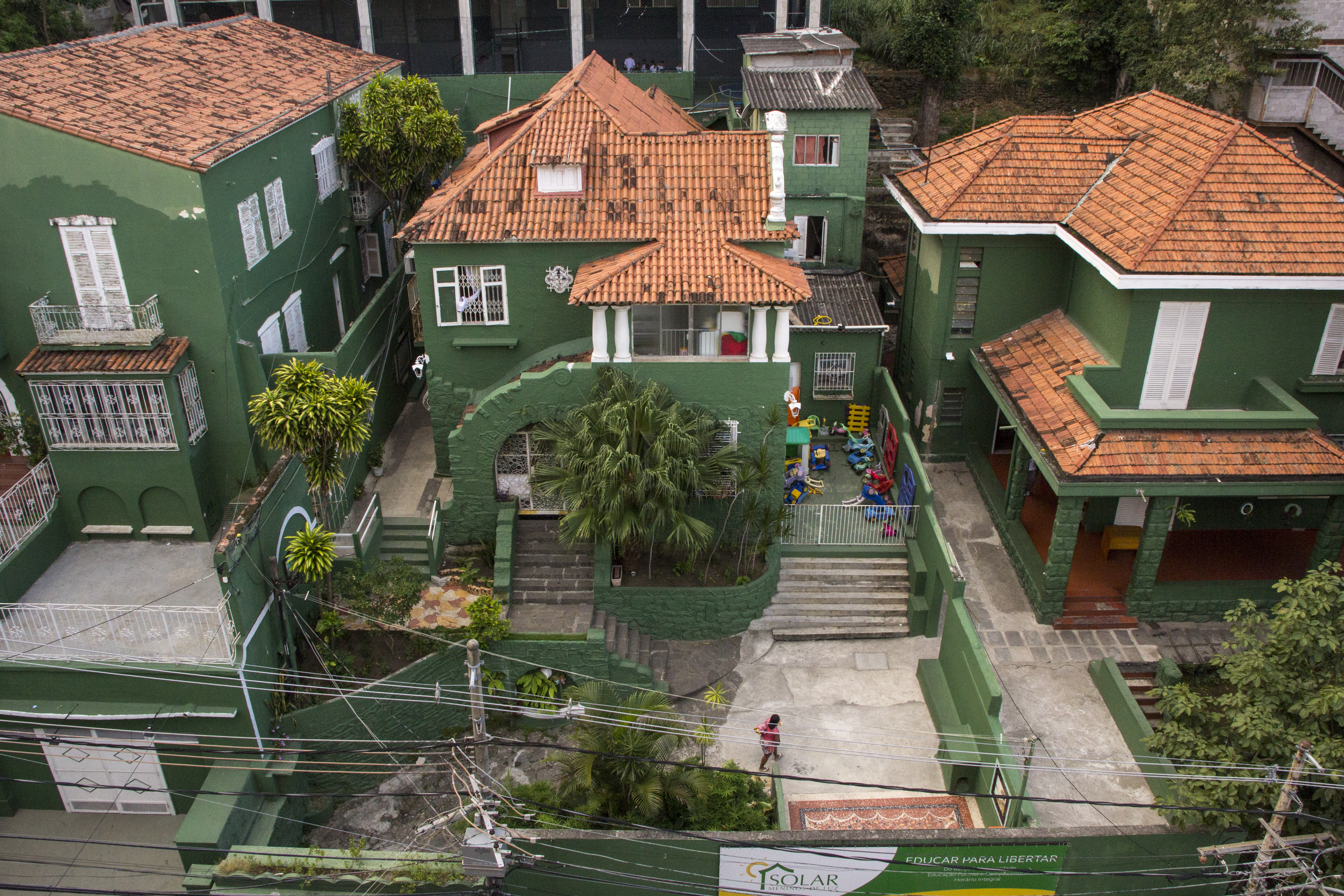 Uma foto das casas que compõem Escola Integral Solar Meninos de Luz